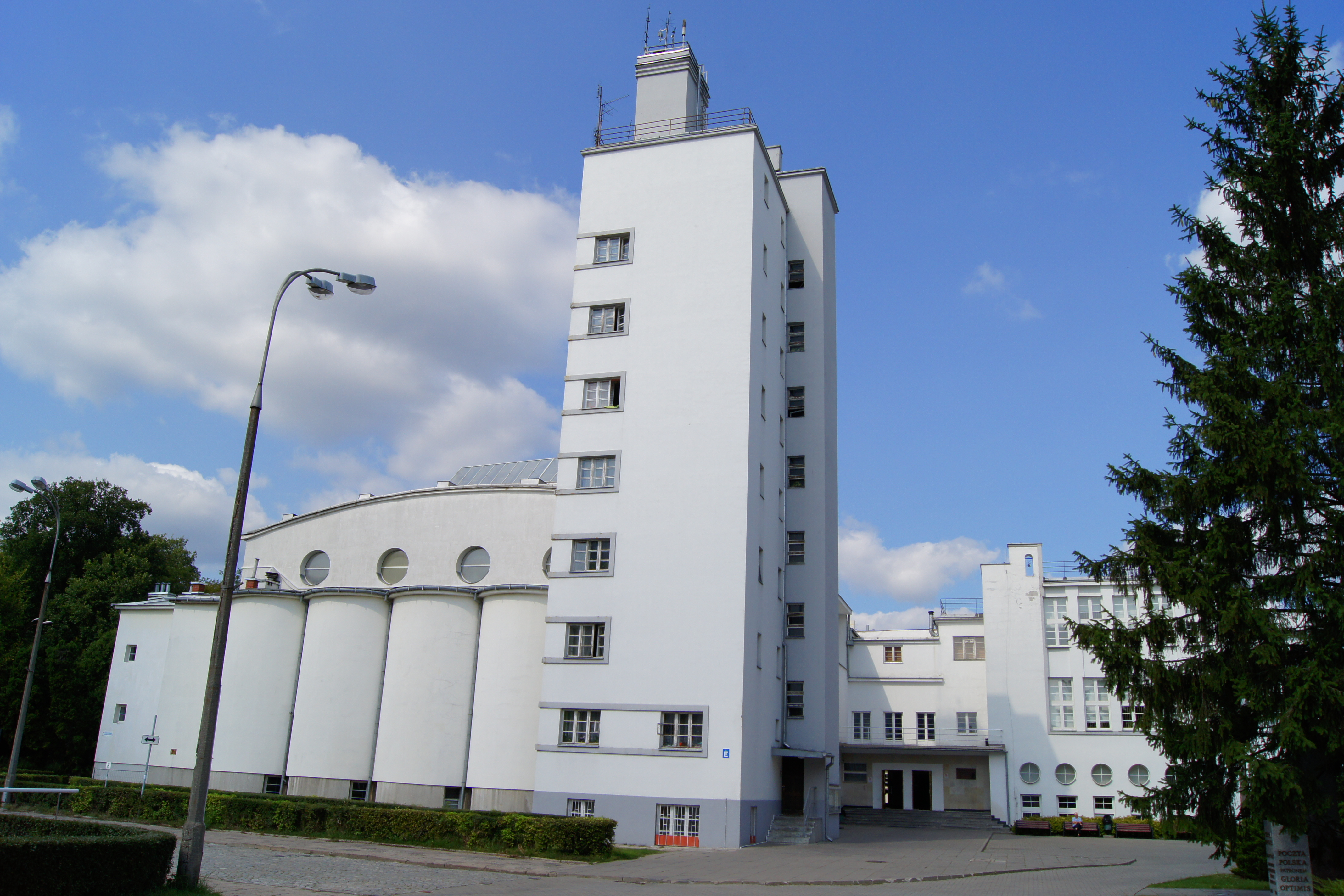 zespół Akademii Wychowania Fizycznego, gmach główny (z pływalnią i wieżą ciśnień), ul. Marymoncka 34, Warszawa, dz. Bielany